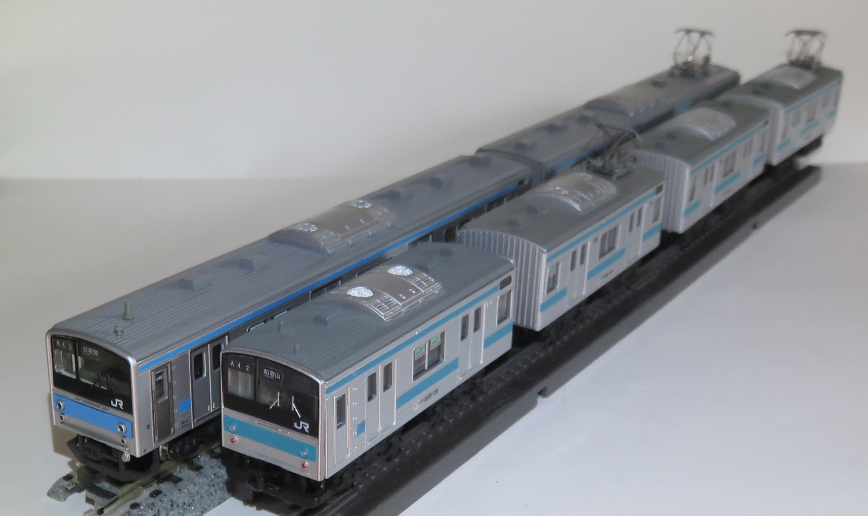 Bトレインショーティー車両とNゲージ車両の比較（205系）